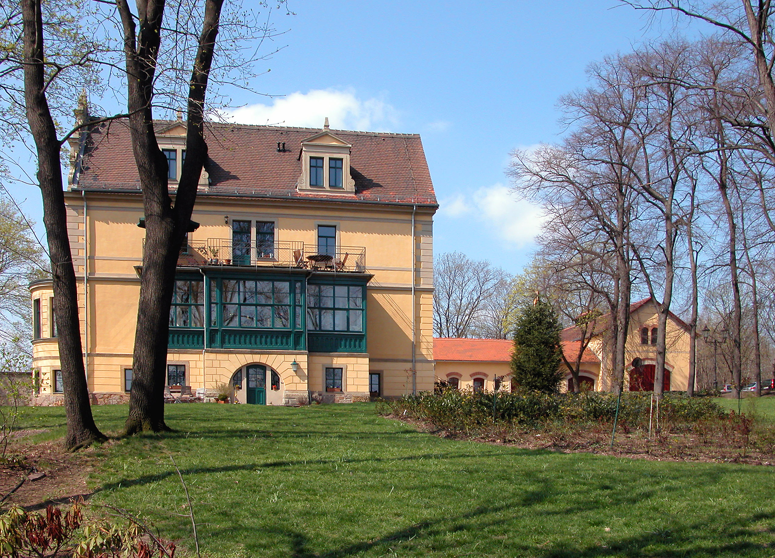 10.04.2004 01445 Radebeul: Villa Wettinhöhe, Auerweg 2 (GMP: 51.119157,13.615186). Bis zur Mitte des 19. Jahrhunderts befand sich auf der Wettins Höhe ein Weingut mit Weinberg und Winzerhaus. Carl Gottlob Wackwitz fügte 1858/1859 eine Weinschänke hinzu. 1879/1880 ließ der preußische Geheimrat Alfred Piper durch die Radebeuler Baumeister Gebrüder Ziller Gebäude zum repräsentativen sog. Schloß Wettinhöhe erweitern. Ab 1916 wechselnde soziale und medizinische Nutzungen. 1997 privatisiert, Wohnhaus. Sicht von Osten. [DSCN2726.TIF]20040410600DR.JPG(c)Blobelt